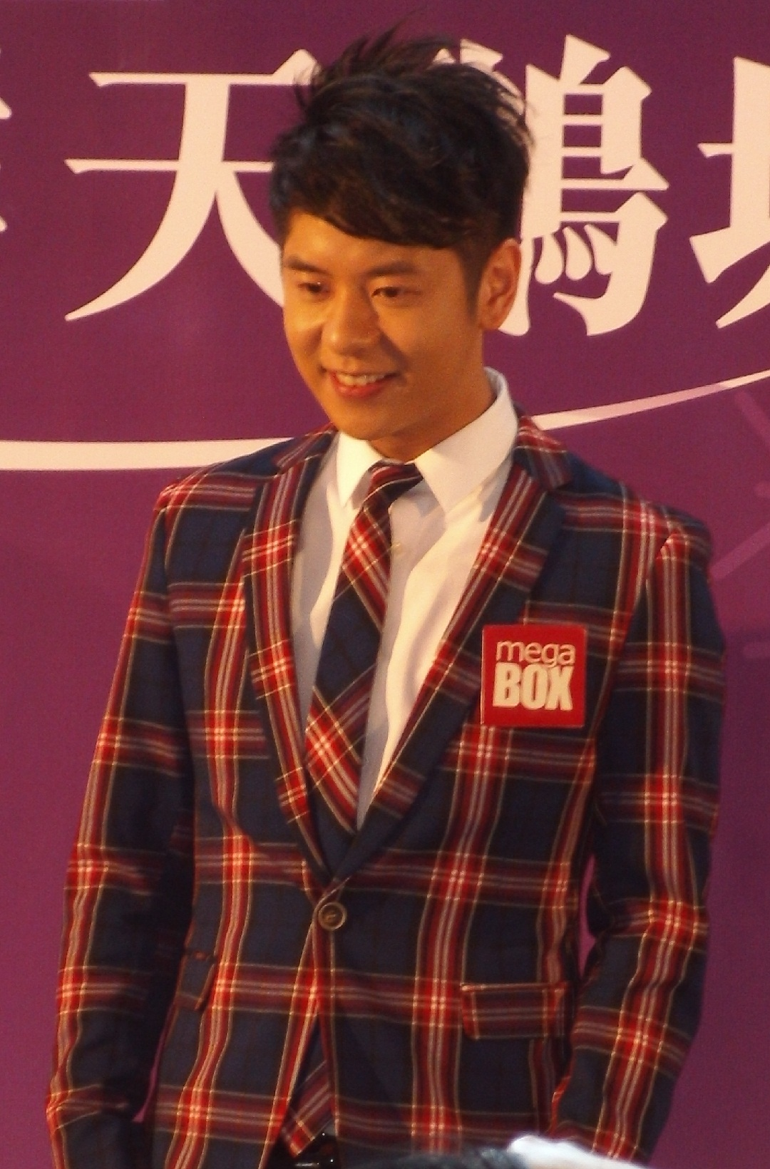 許廷鏗的樣子